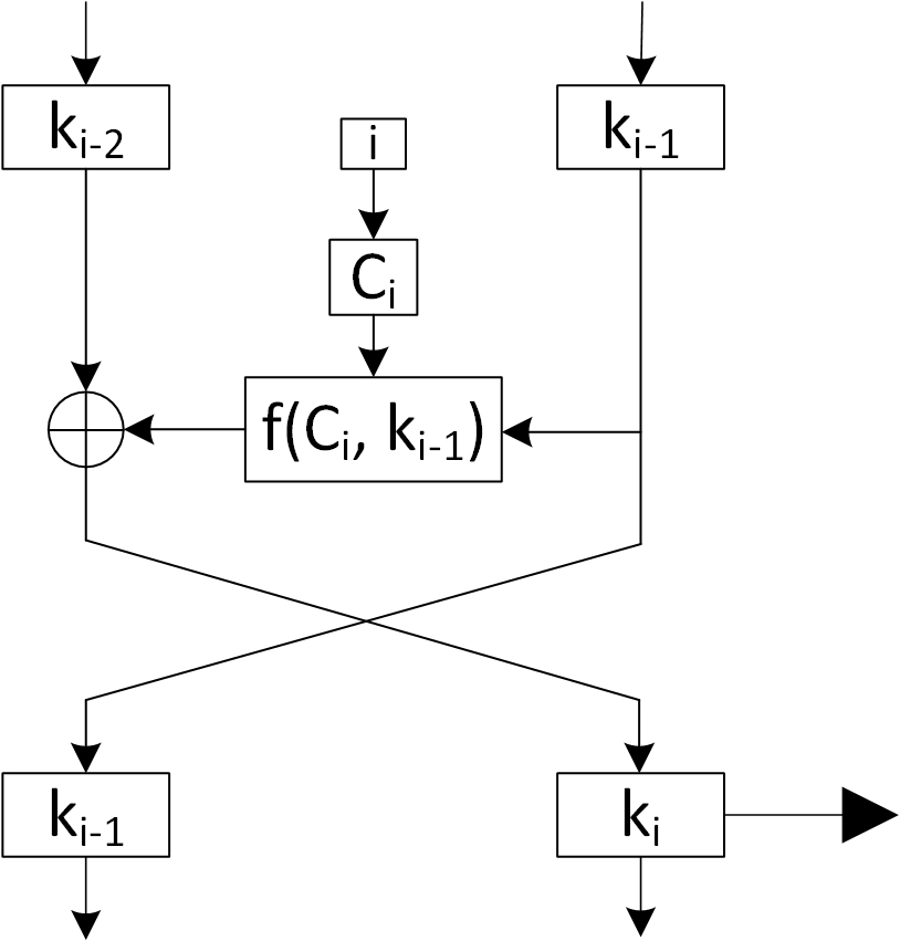 Ячейка Фейстеля, использующаяся в процедуре расширения ключа шифра KHAZAD